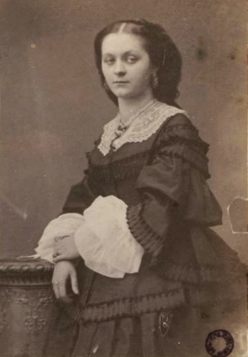 Aleksandra z Chodkiewiczów Kossakowska (1840-1880)